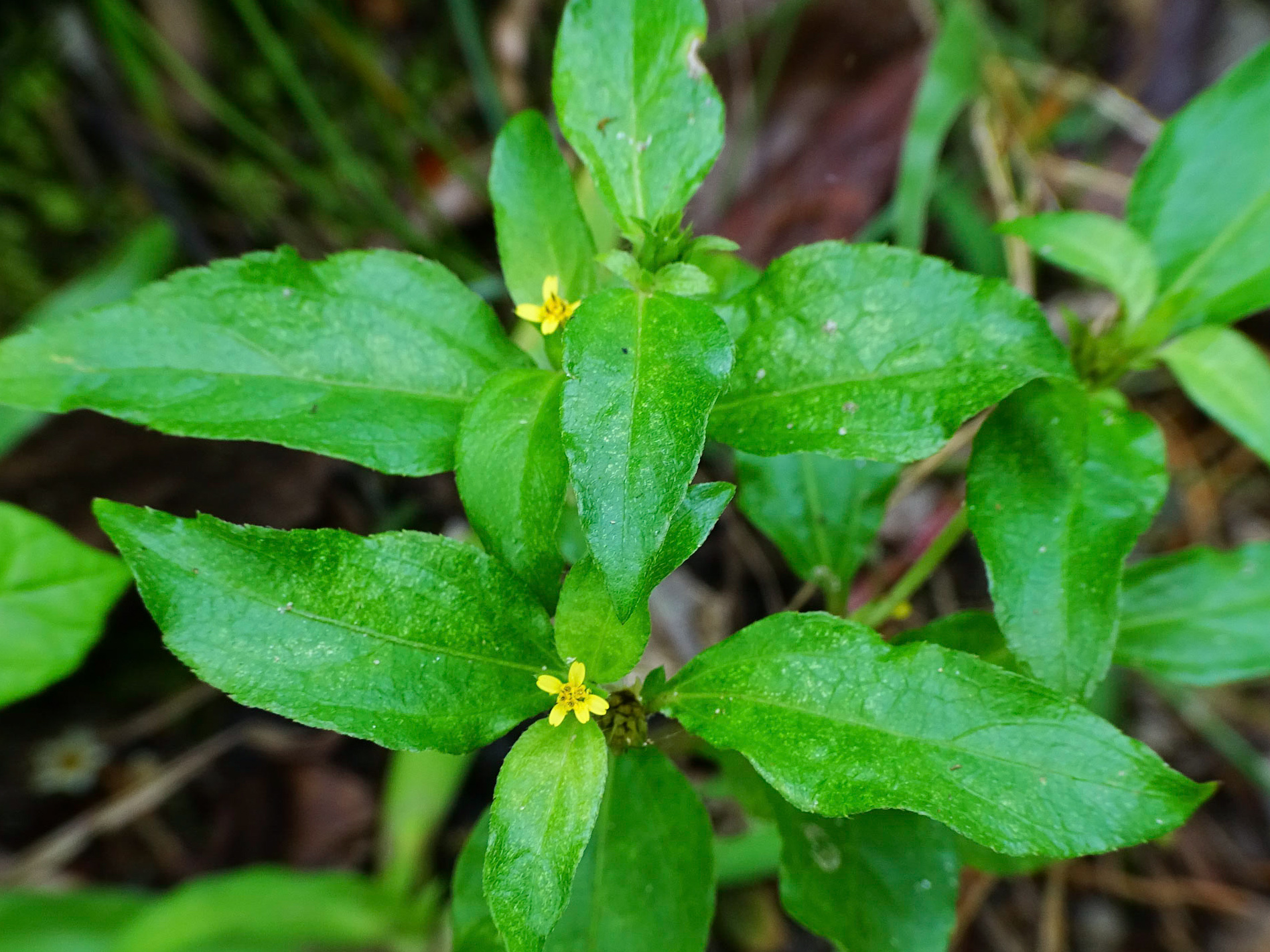 Synedrella nodiflora, Cinderella Weed. From Ezhupunna